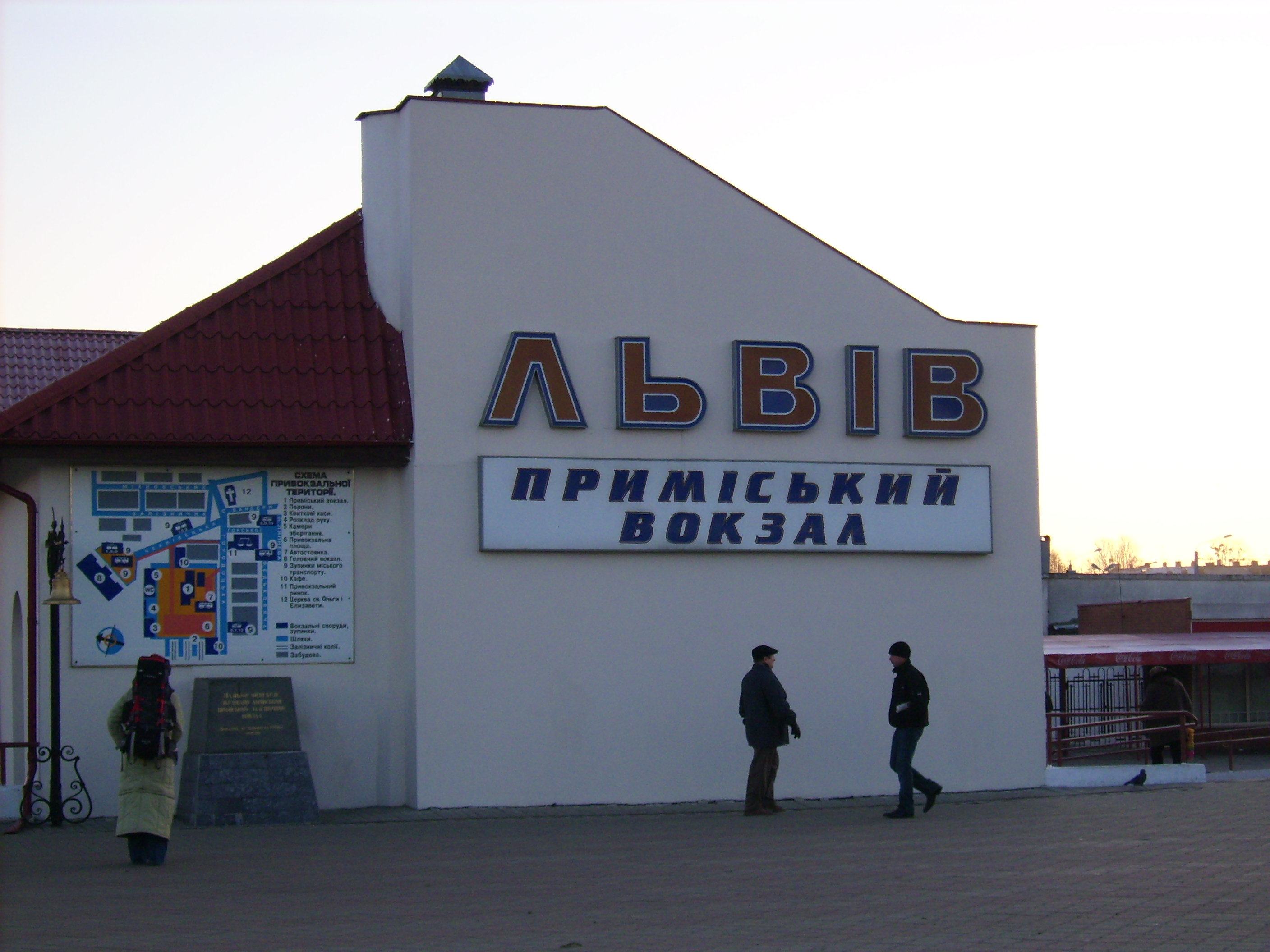 Lviv Suburban Rail Terminal, Ukraine